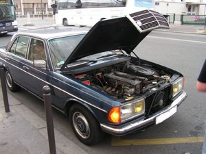 la 280E de Roger photo prise par Peka-w123